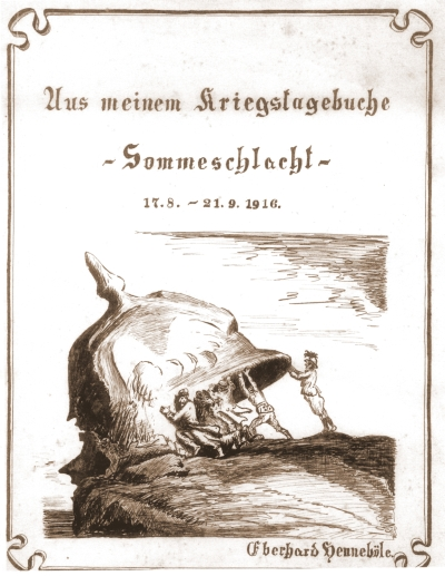 Umschlag Kriegstagebuch